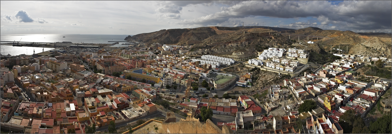 Spain, Almeria, Alcazaba